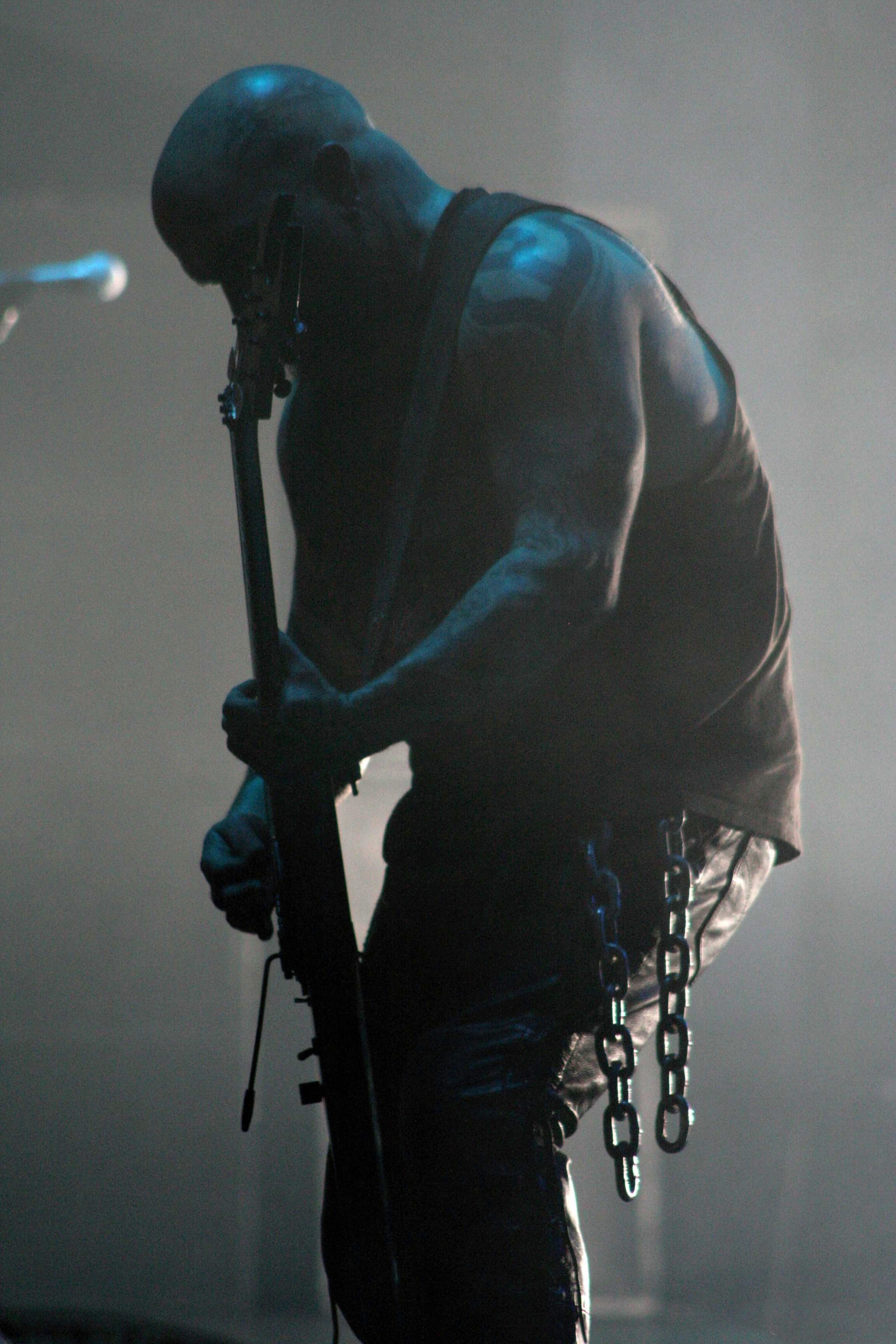 Kerry King von Slayer